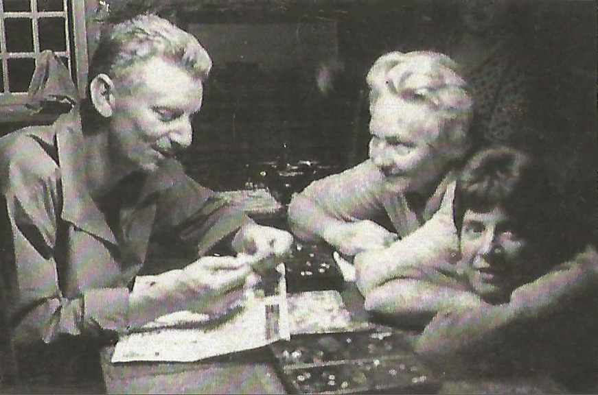 portrait